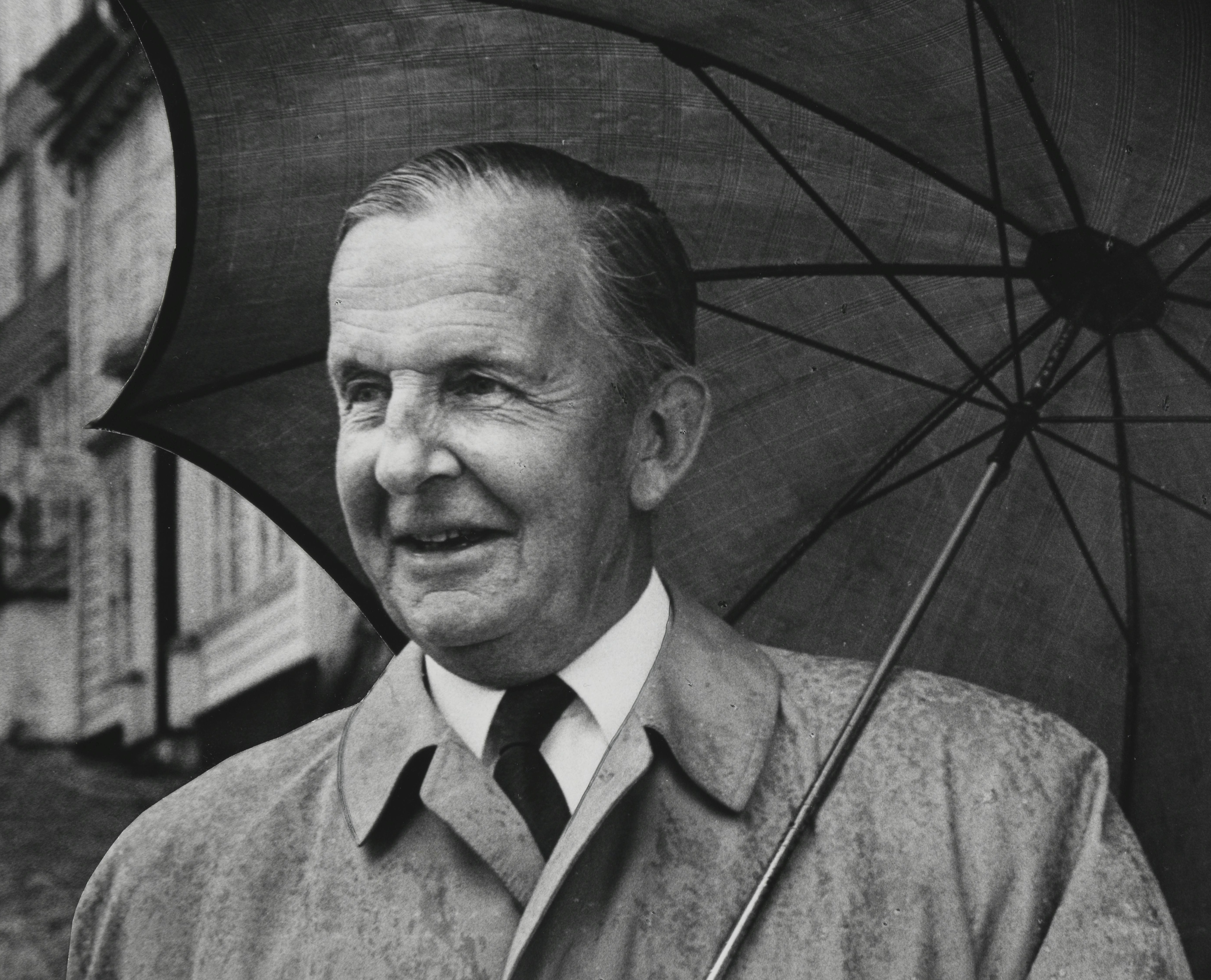 Arkitekt og konservator Kristian Bonnevie Bjerknes. Ukjent fotograf, fra Nasjonalbibliotekets samling.